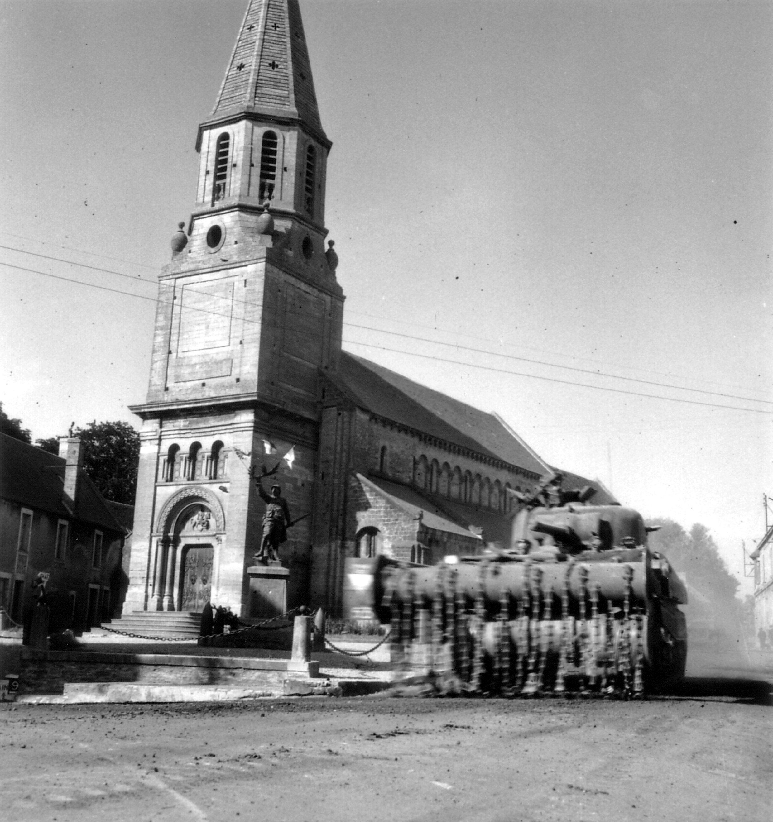 Devant une église de Creully, un char britannique Crododile passe à côté d'un monument aux morts. Il est représenté par un soldat de la première guerre mondiale tenant dans sa main les drapeaux français, britannique et américain.